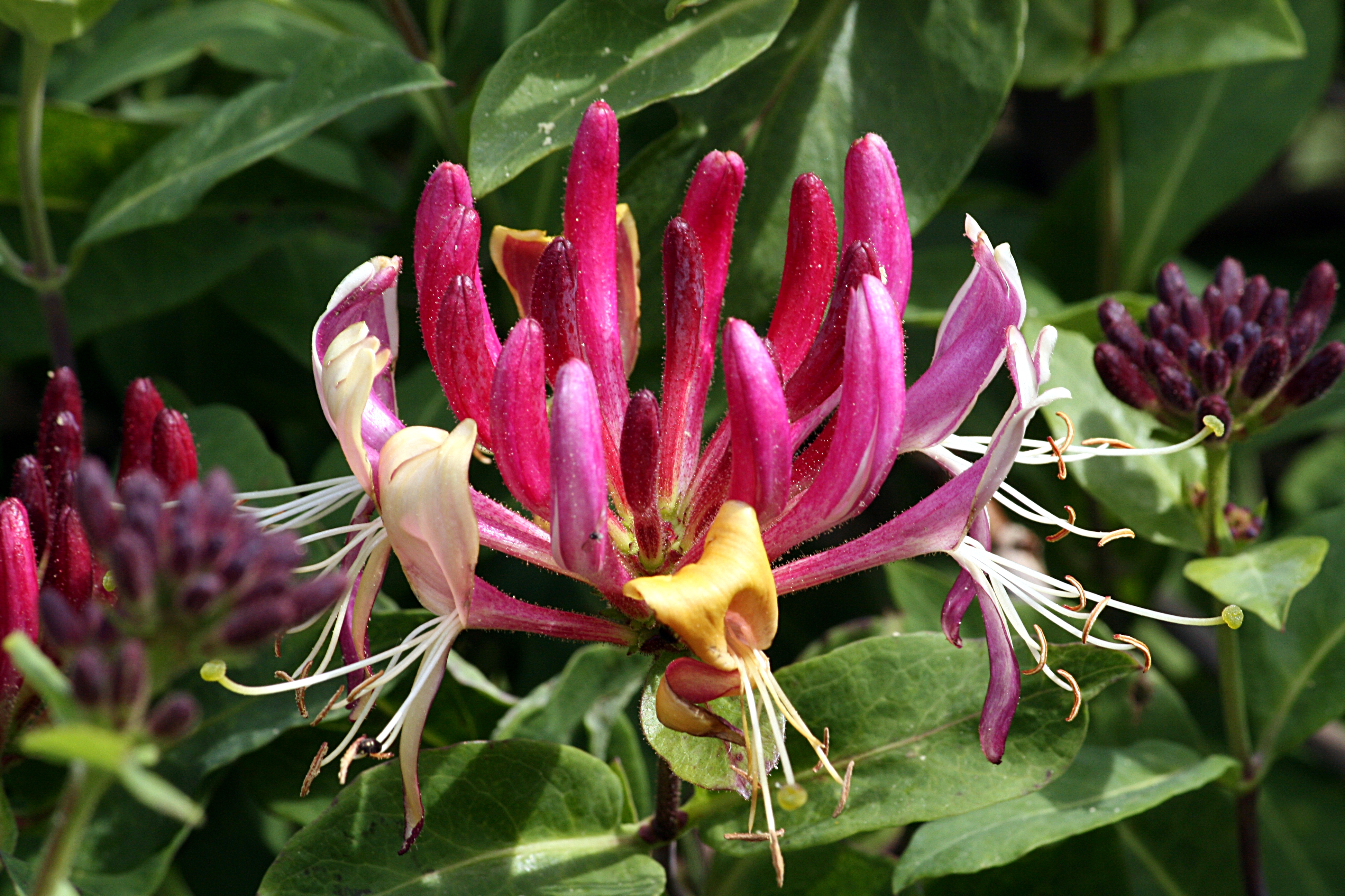 möglicherweise Deutsches Geißblatt (Lonicera periclymenum) Jelängerjelieber, Geißblatt, Lonicera-caprifolium